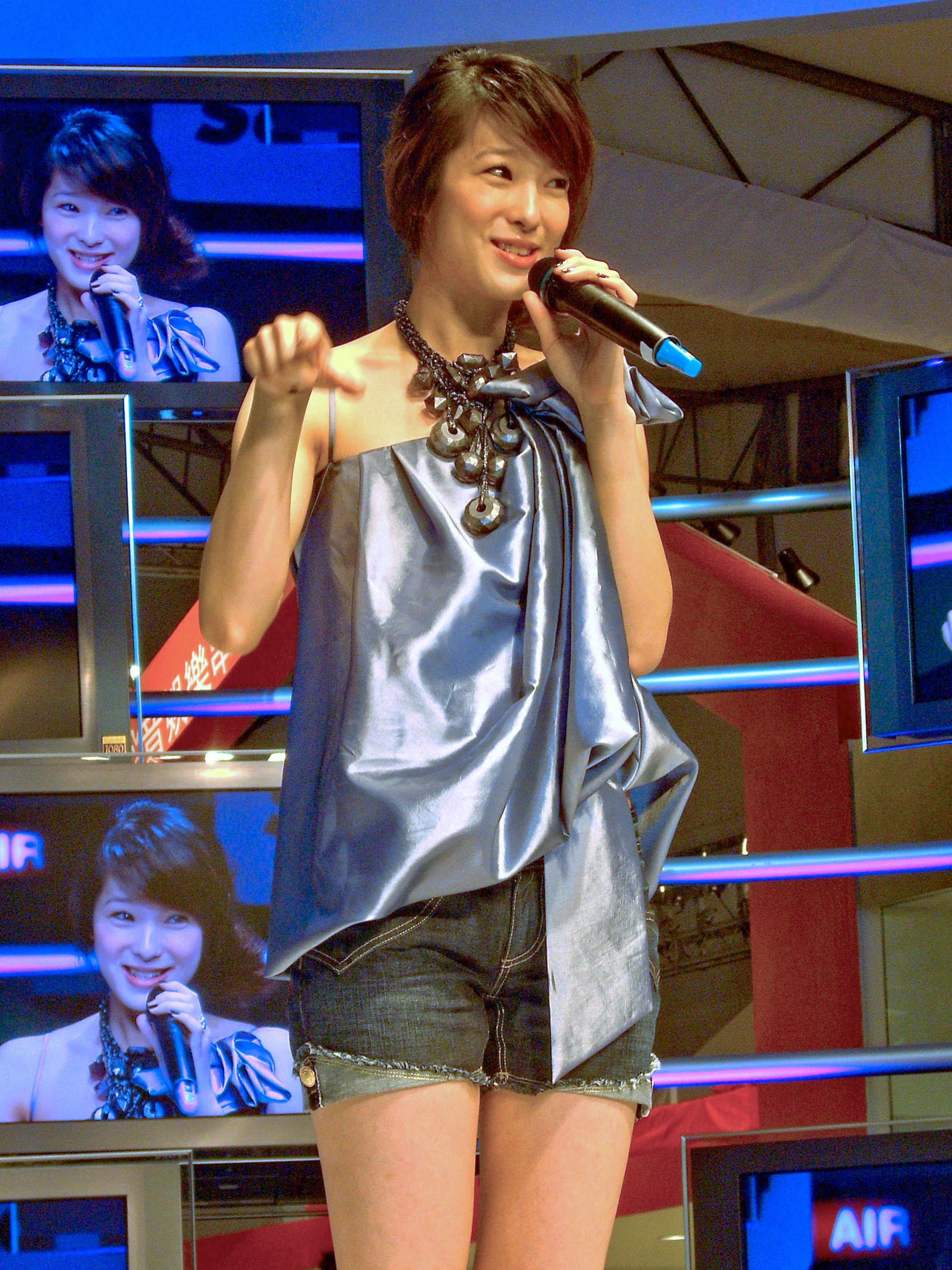 Sony Fair 2008: Megan Lai.